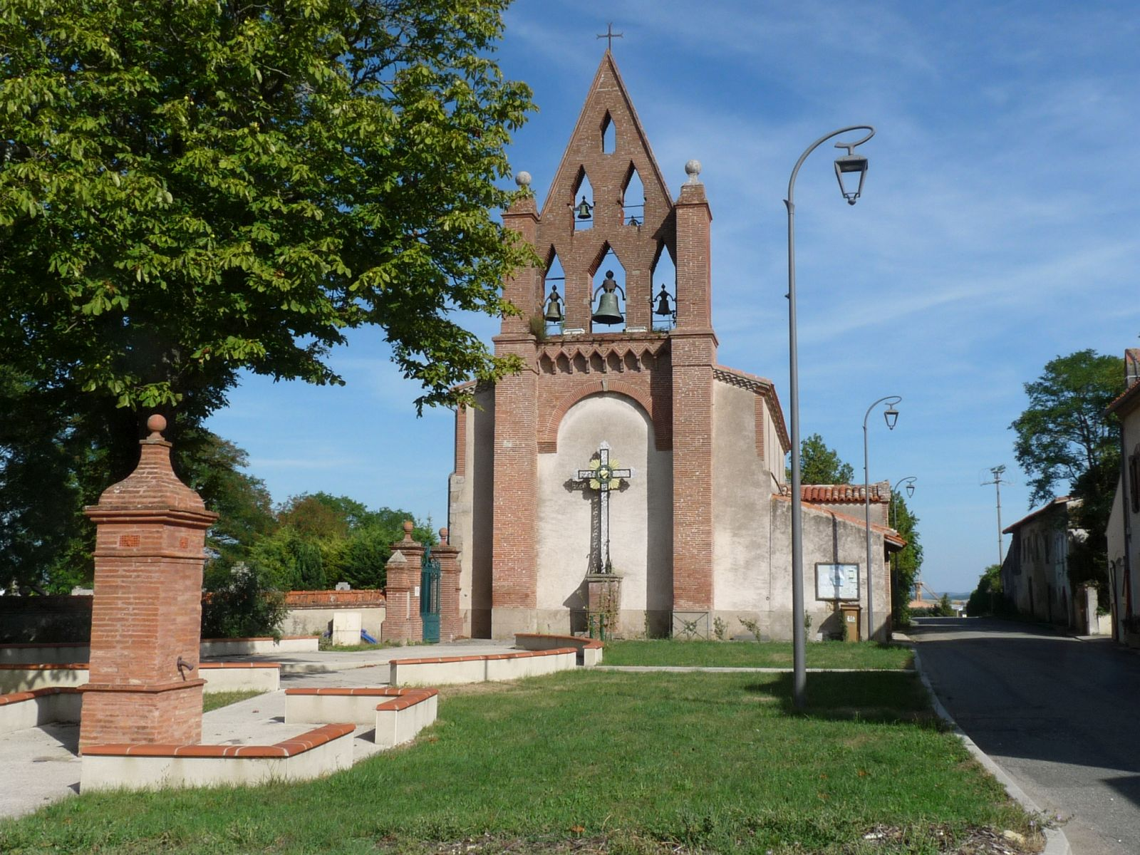 Eglise de Montclar-Lauragais, Haute-Garonne, France